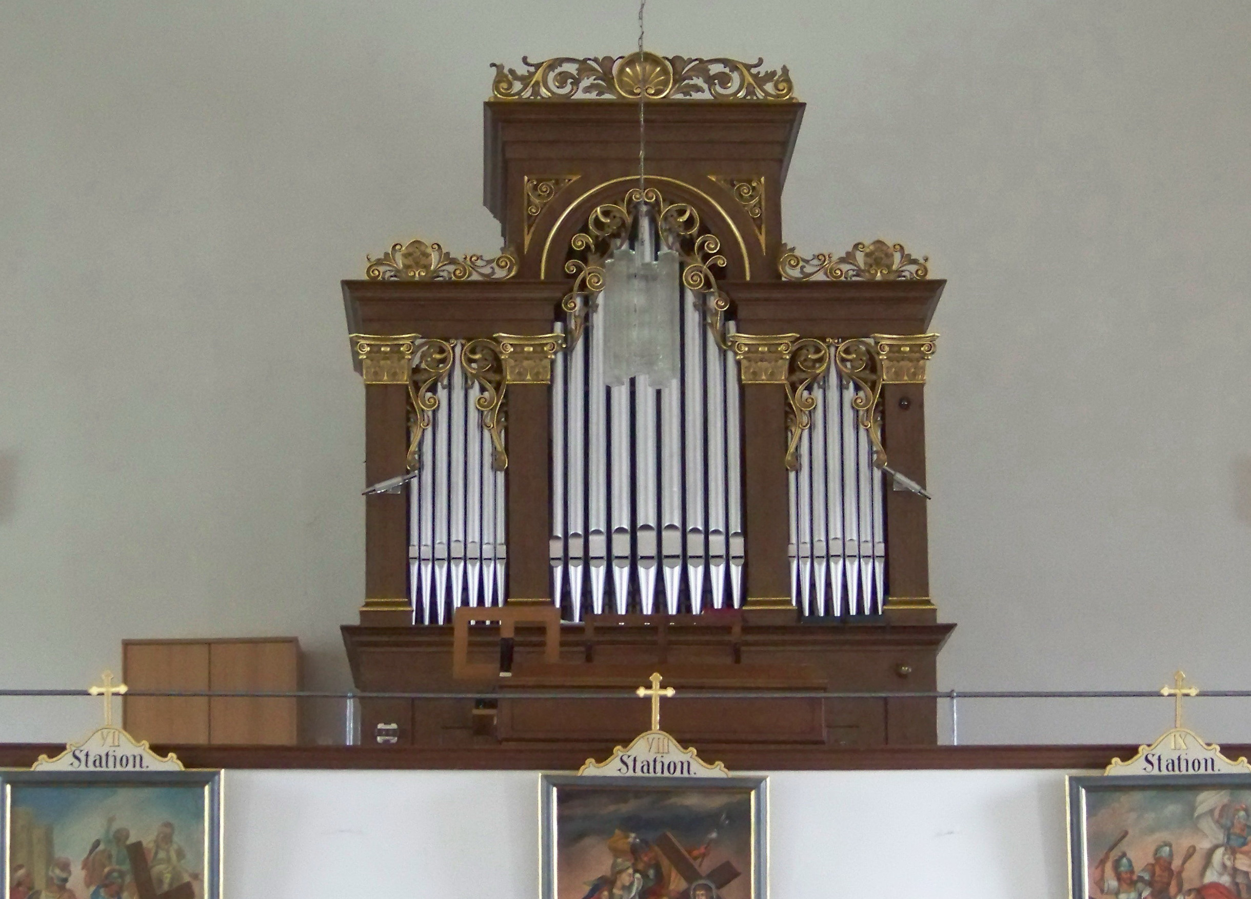 Neufahrn in Niederbayern. Hebramsdorf 5. Filialkirche St. Johannes der Täufer. Erbaut 1730, über älterem Kern; mit Ausstattung. Auf der Westempore Orgel mit dreiteiligem Prospekt von Martin Hechenberger.